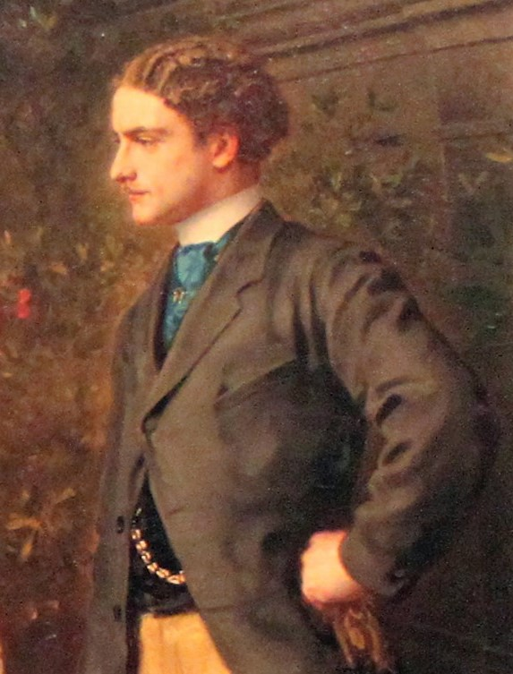 Portrait Arthur Strousberg, ausgeschnitten aus dem Familienbildnis Strousberg von Ludwig Knaus, 1870